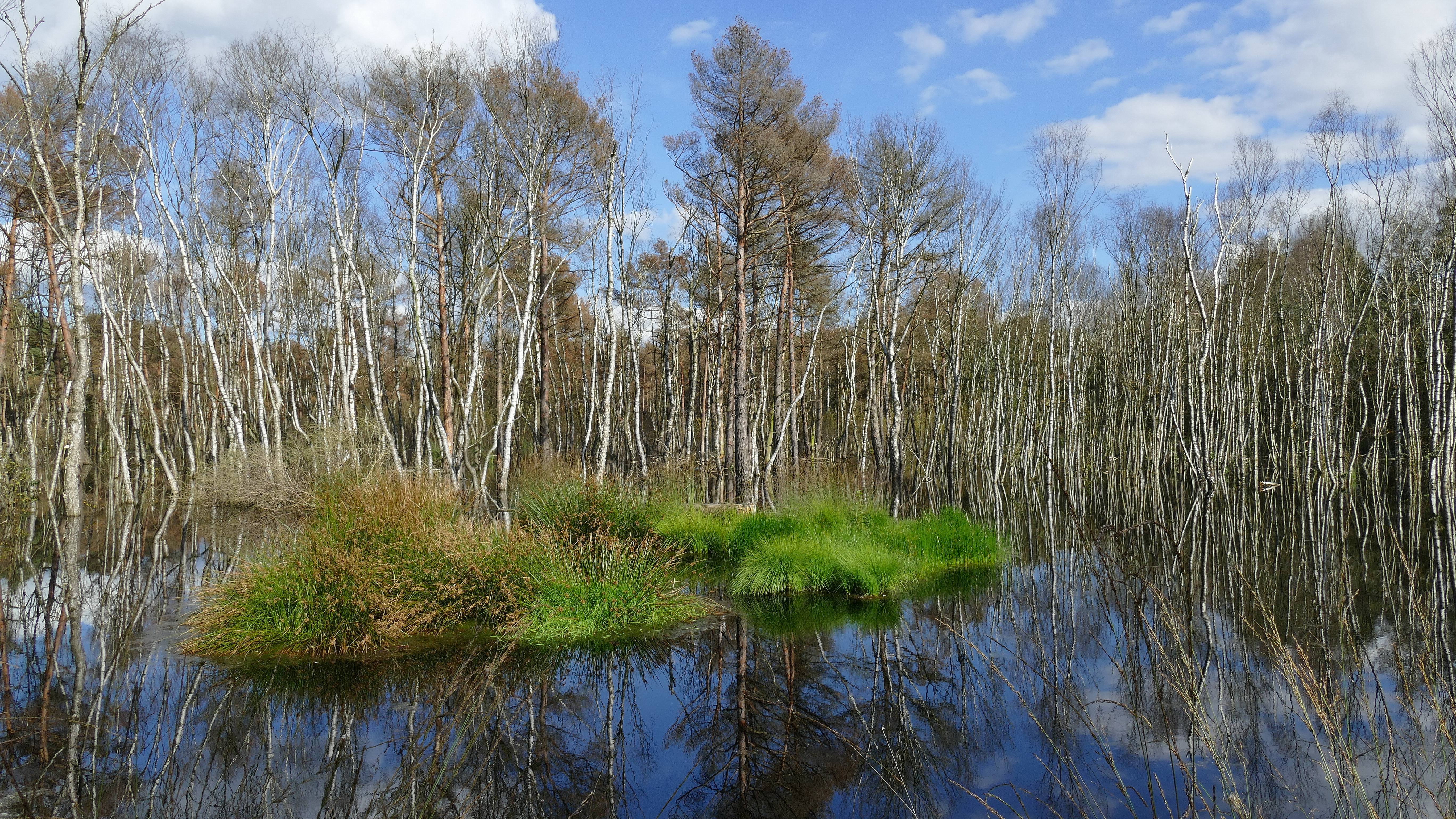 Im Landschaftsschutzgebiet Altwarmbüchener Moor (LSG H-S 11) ist die Wiedervernässung so erfolgreich, dass Birken und Kiefern allmählich absterben oder schon abgestorben sind. Das fotografierte Gebiet liegt im FFH-Gebiet Altwarmbüchener Moor (DE-3525-331).